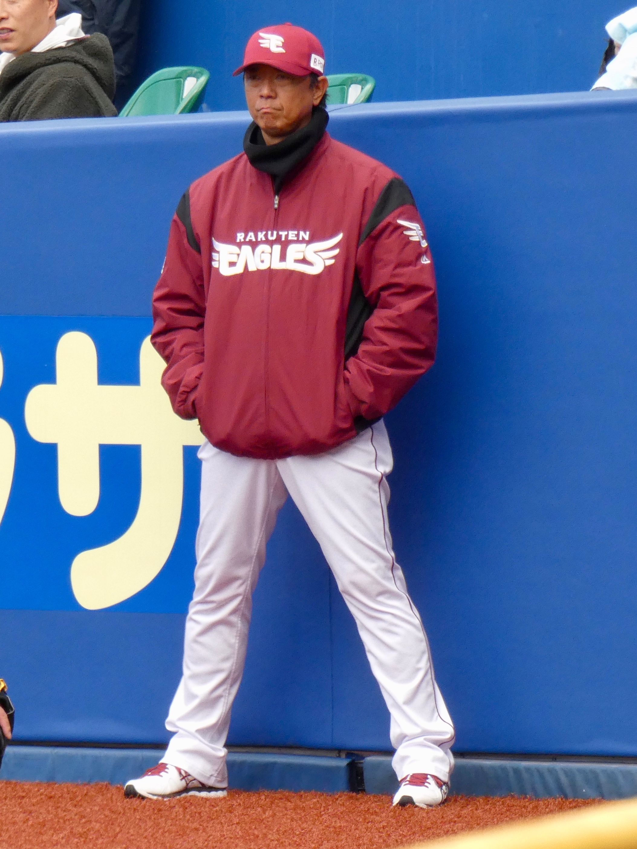 東北楽天ゴールデンイーグルスのコーチ「伊藤智仁」。ZOZOマリンスタジアムにて。